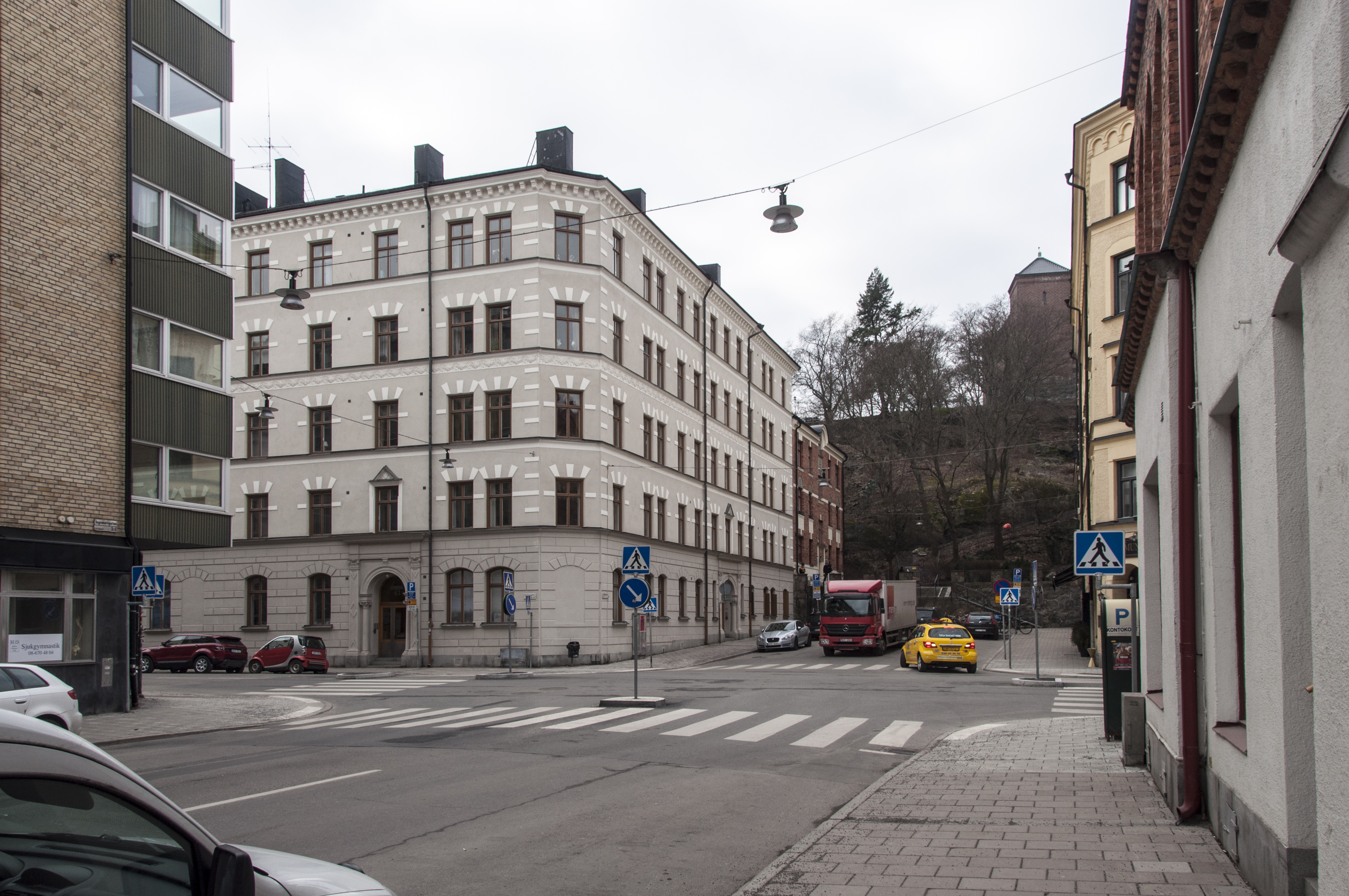 Ingemarsgatan. I centrum Vilan 4. Nybyggnadsår 1891 - 1892 Gustaf Adolf Fristedt (Arkitekt) Gustaf Adolf Fristedt (Byggmästare) Olaus Olsson (Byggherre)